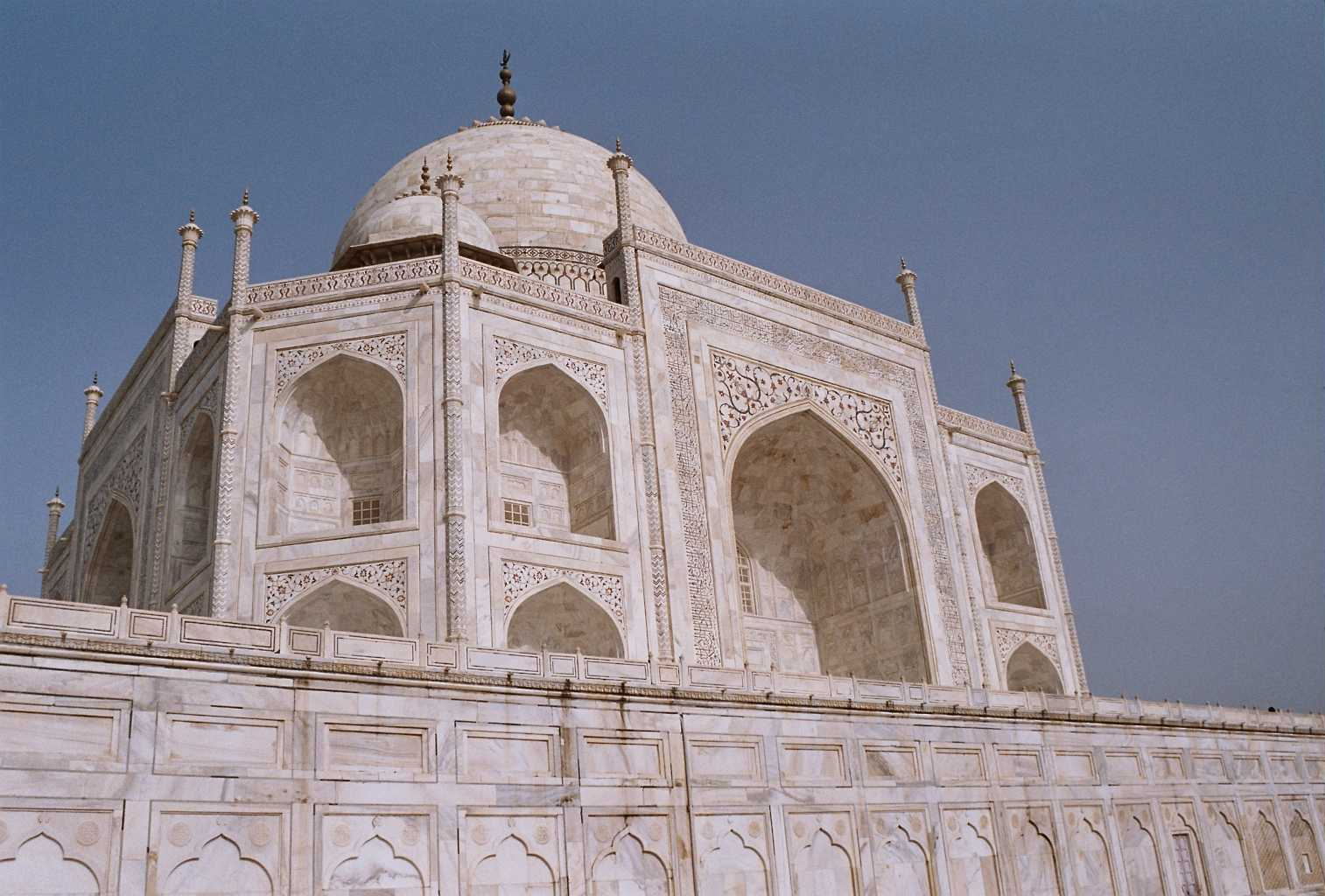 Taj Mahal in Agra, India. Picture take by Núria Pueyo, august 2005.